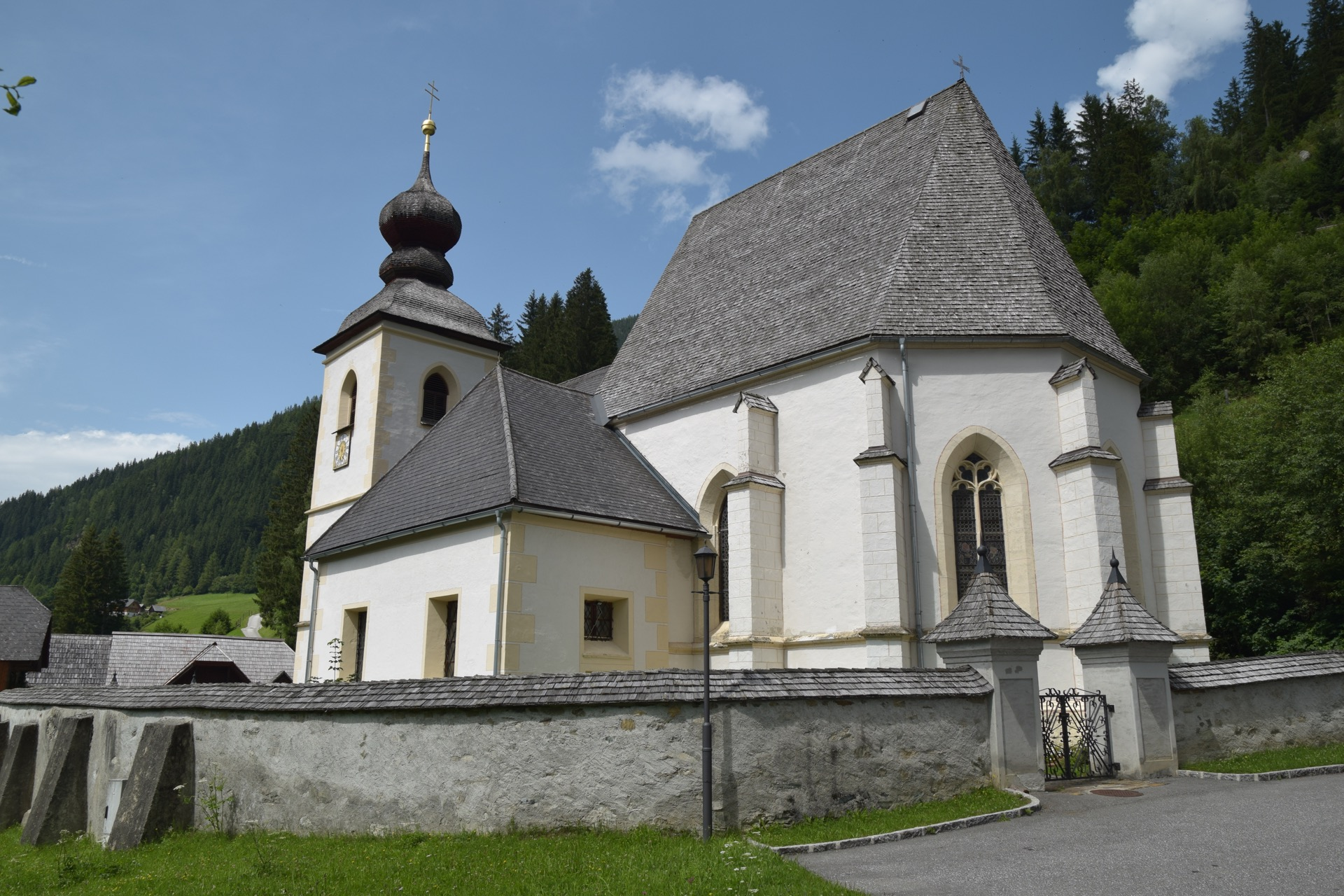 Kath. Pfarrkirche Mariä Geburt und Friedhof